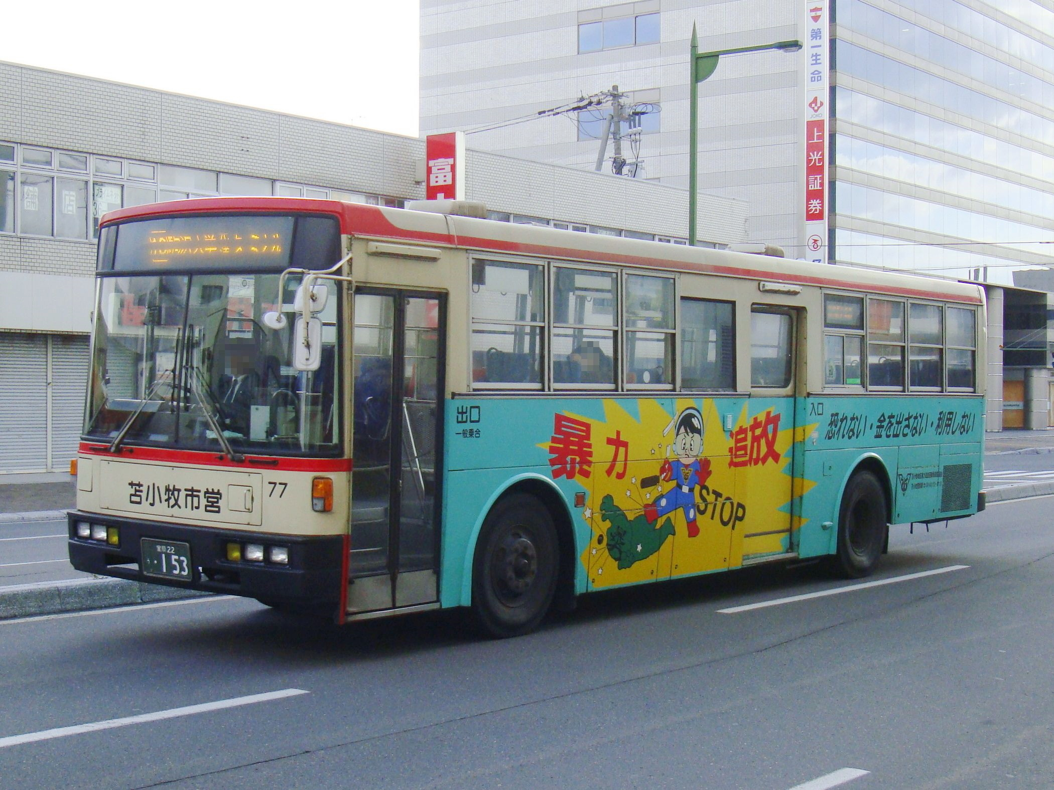 Tomakomai city line